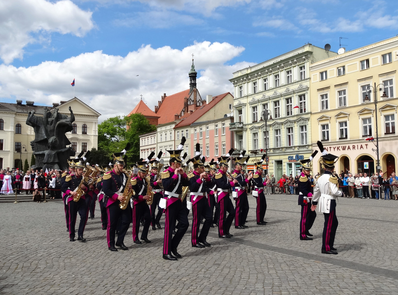 Święto Konstytucji 3 Maja 2014 roku na Starym Rynku w Bydgoszczy z udziałem orkiestry wojskowej garnizonu bydgoskiego oraz Zespołu Pieśni i Tańca Ziemia Bydgoska